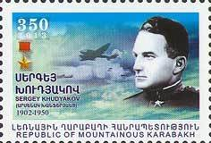 Sergey Khudyakov (1902-1950)